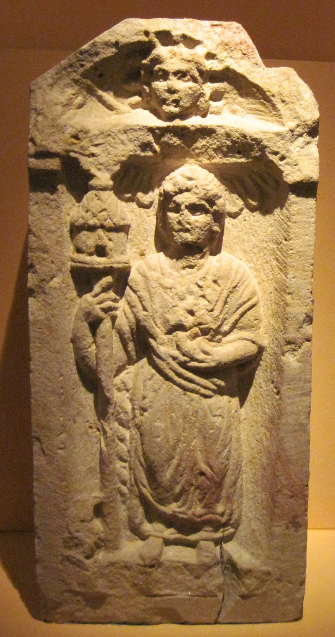 Interlingua: Basse relievo del dea gallic Nantosuelta, trovate a Speyer in le actual Germania.